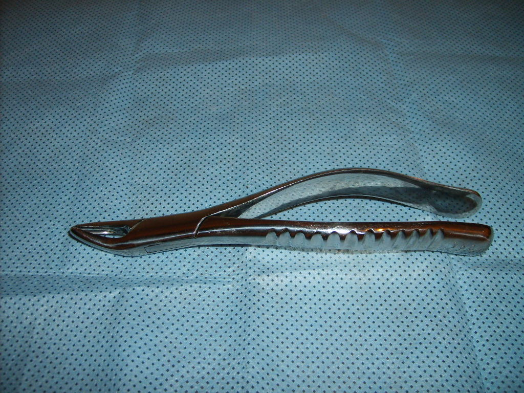 Fórceps n. 150 - utilizado em odontologia